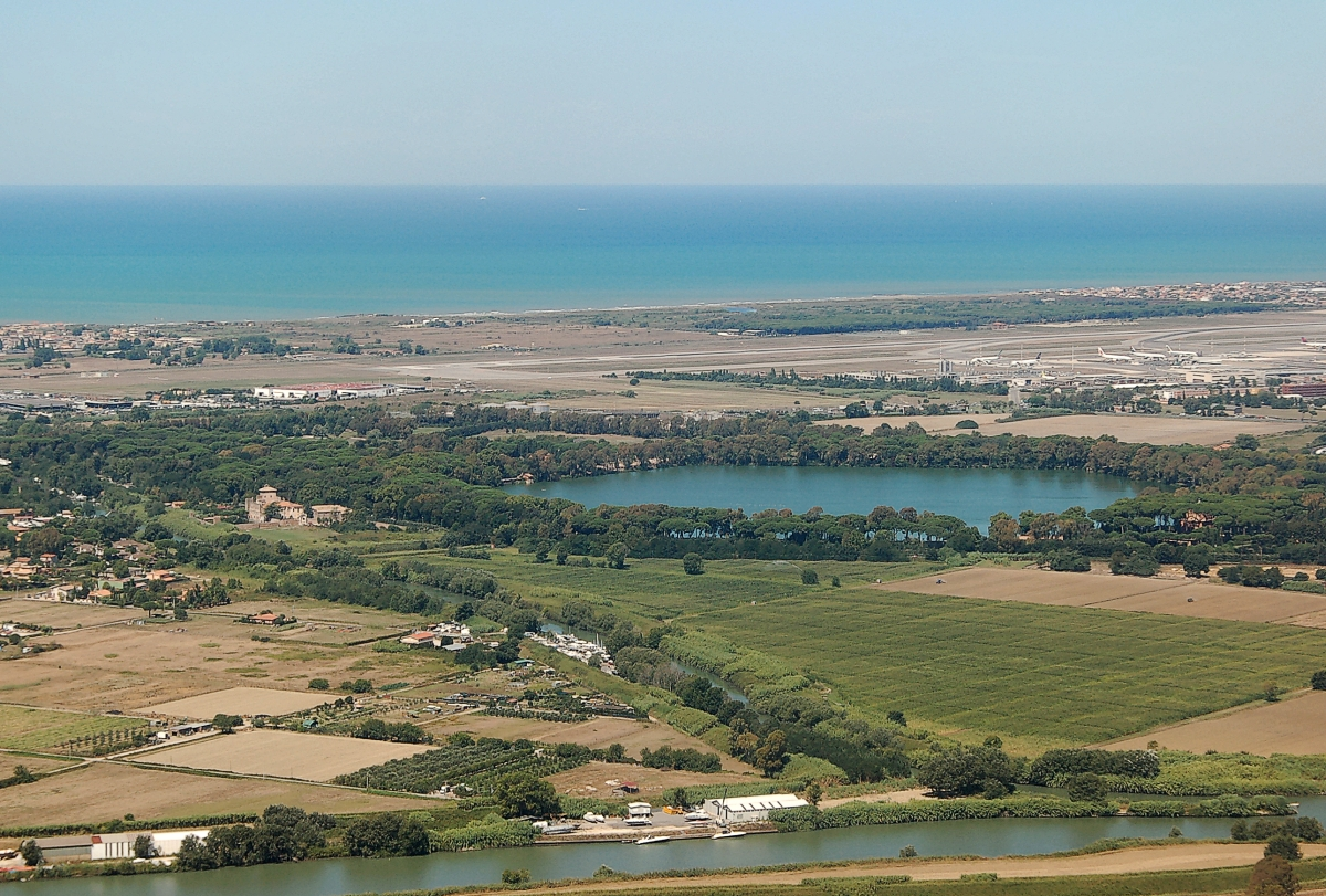 Fiumicino 2011 Durch die Übernahme der UMTS Kosten durch den gemeinnützigen Vereins Skillshare.eu konnte dieses Bild bereitstellen werden. Skillshare e.V. ist ein eingetragener gemeinnütziger Verein zur Förderung der Bildung durch Unterstützung der Erstellung, Sammlung und Verbreitung so genannten freien Wissens. IBAN: DE16 8306 5408 0004 8850 66 BIC: GENODEF1SLR Bank: VR-Bank Altenburger Land